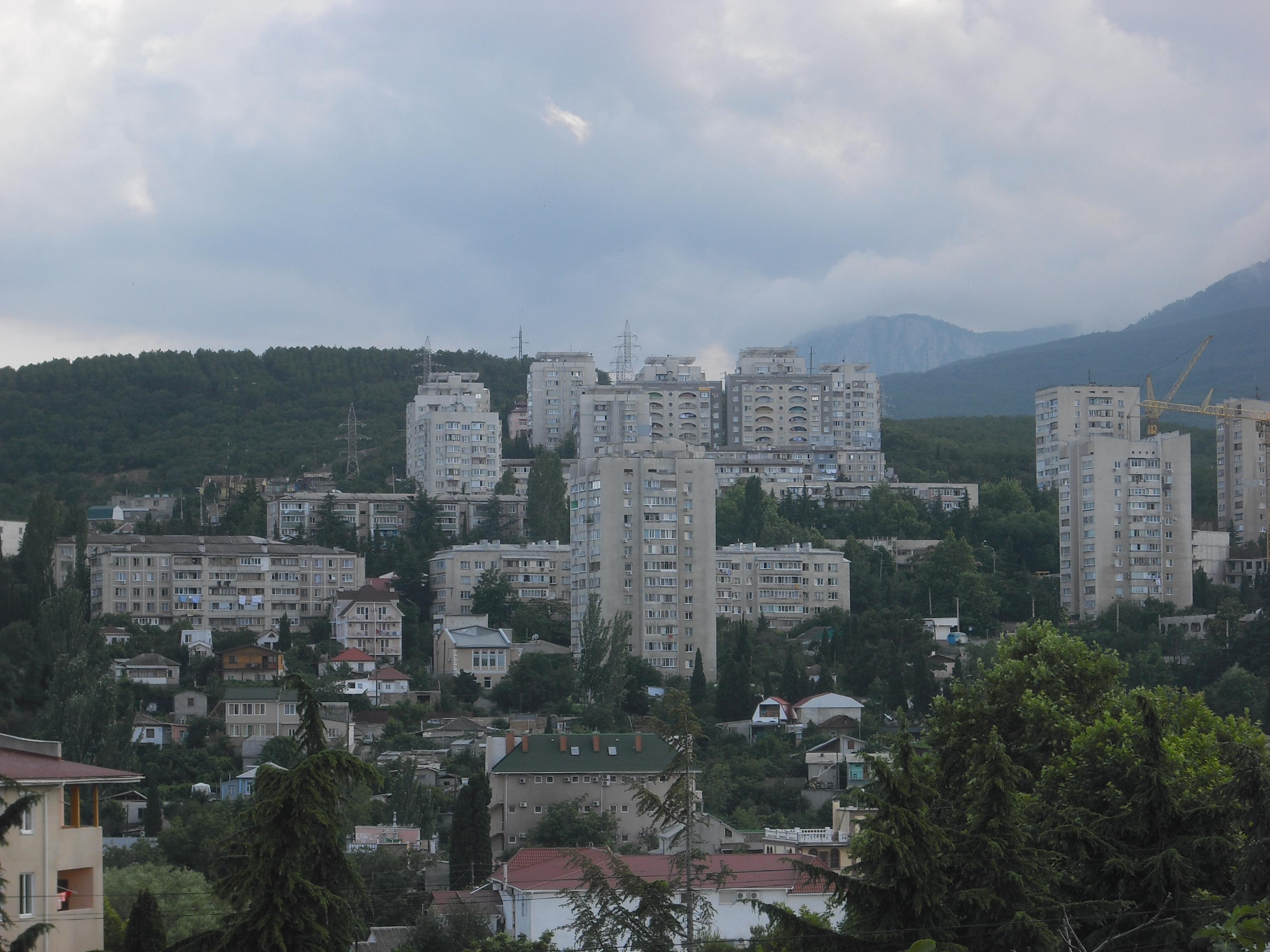 Панорама одного из микрорайонов Алушты